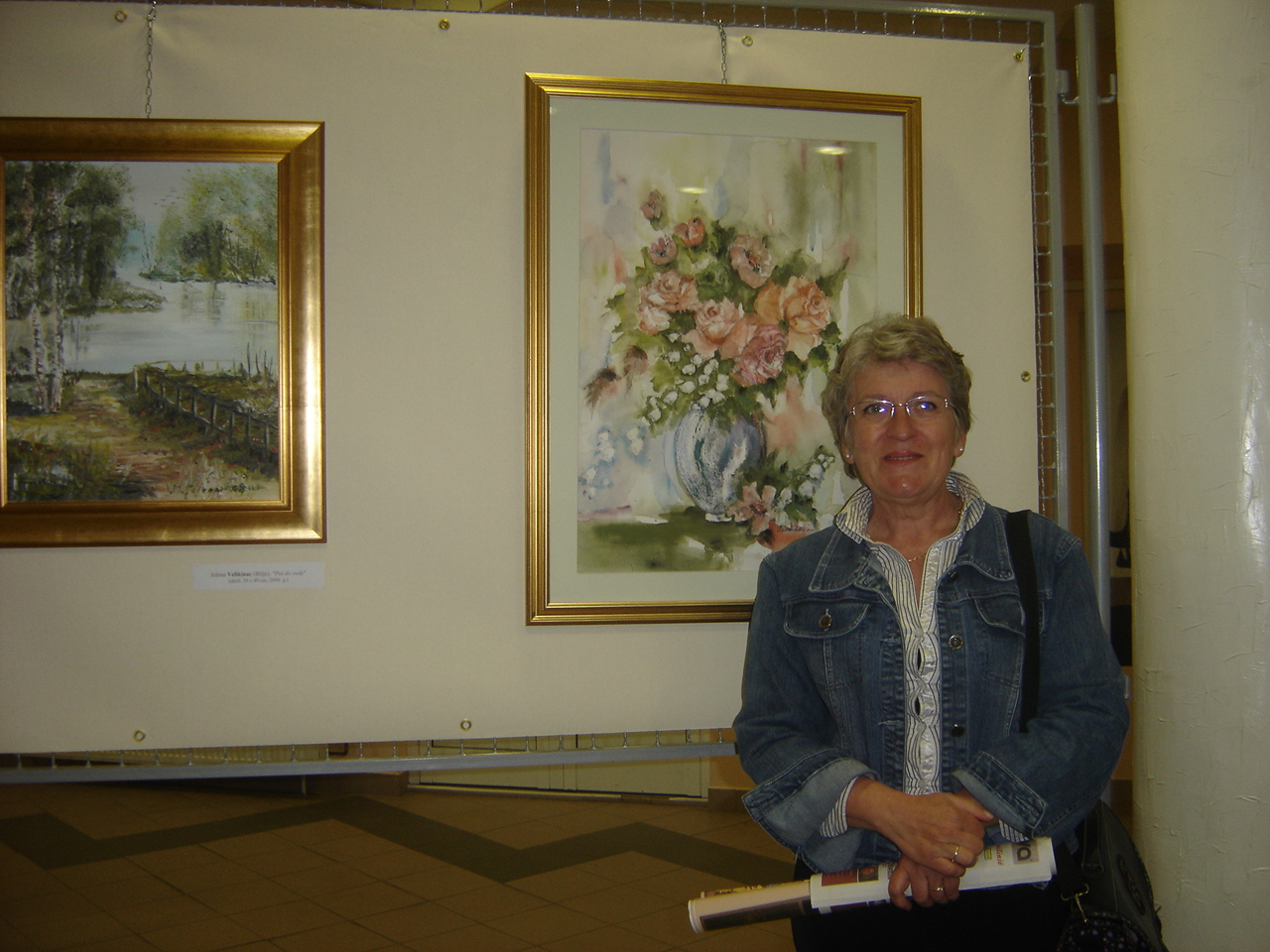 Biserka Radišić uz svoju sliku na izložbi Baranjske bisernice